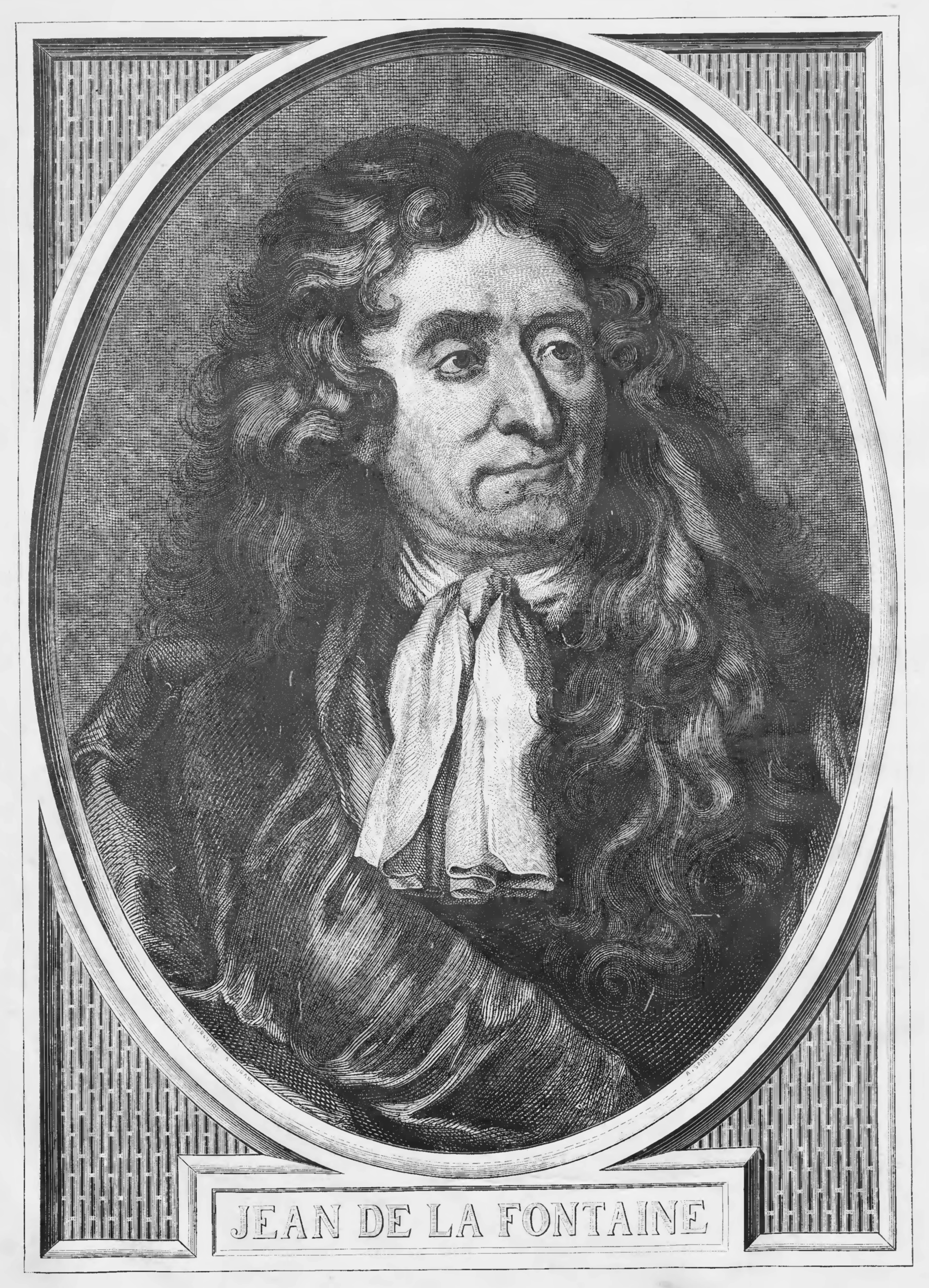 grafika z książki PL publikacja: Nakładem i drukiem Jana Noskowskiego, Warszawa 1876